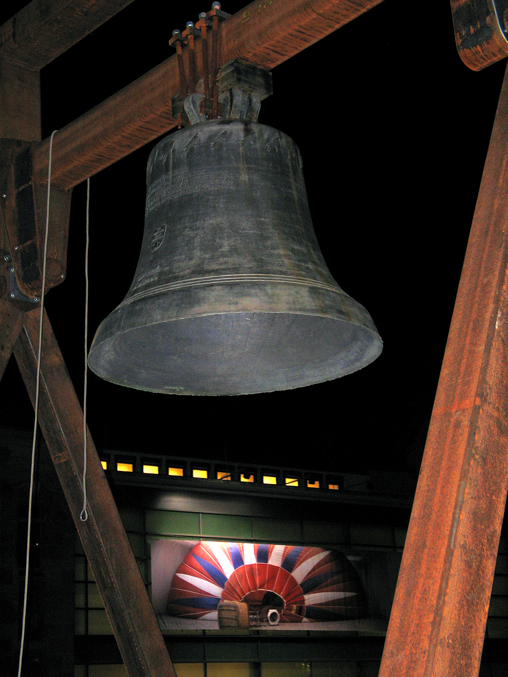 Bald fertig: Die Glocke der Arbeit "For Whom" von Kris Martin hängt schon; im Hintergrund ist der optische Hinweis der Kestnergesellschaft auf die kommende Ausstellung Every Day of the Weak mit Werken des Malers und Objektkünstlers Chris Martin. Angekündigt ist das Ereignis für Freitag, den 23. November 2012 bis Sonntag den 3. Februar 2013 ...